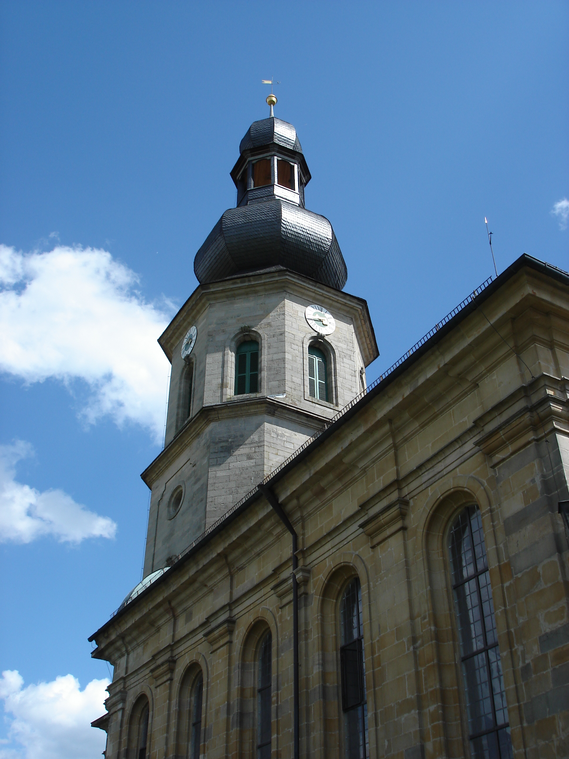 Nordwestansicht der Markgrafenkirche Seibelsdorf (2007)